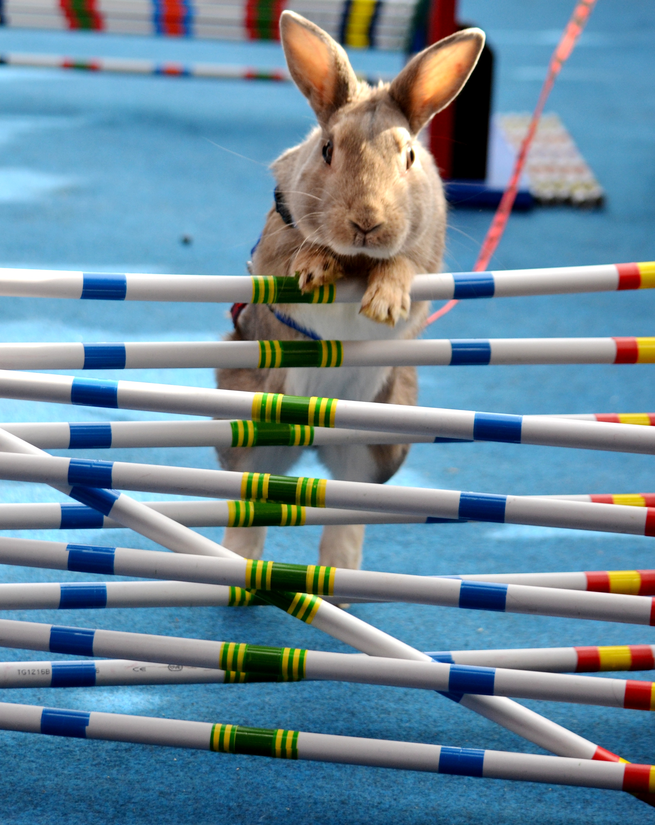 Závody králíků, Staroměstské náměstí, Praha